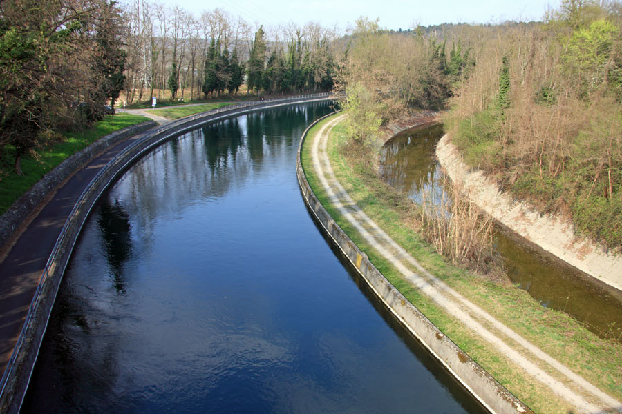 Il Canale Industriale (a sinistra) e il Canale Villoresi (a destra) a Vizzola Ticino (VA)